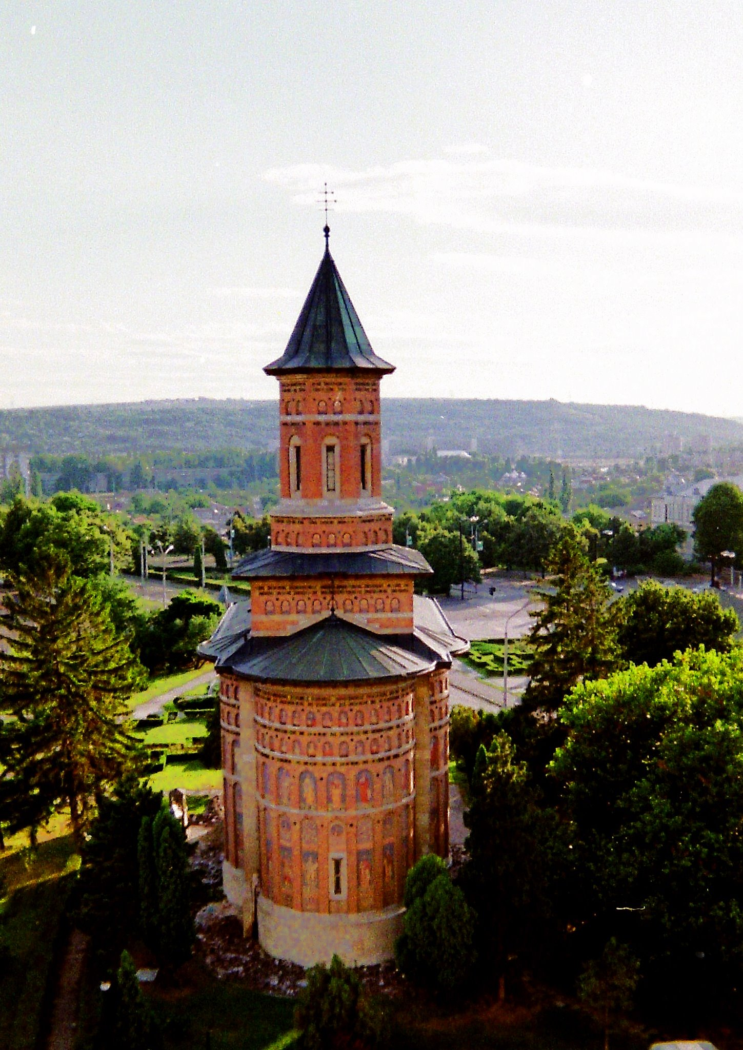 Édifiée par Ştefan cel Mare en 1492, c'est le seul vestige de la Cour princière